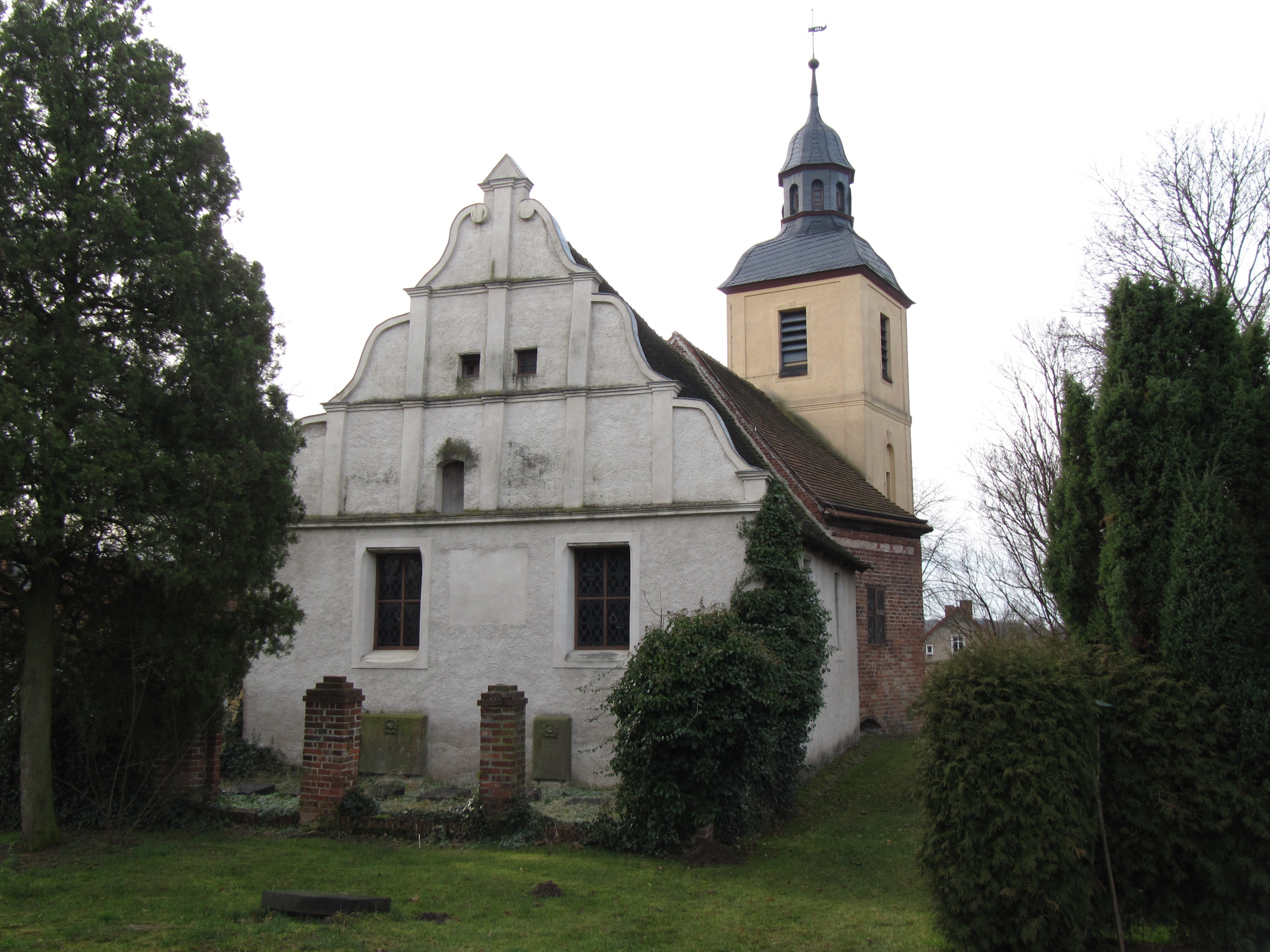 kirche ketzür ostgiebel chor